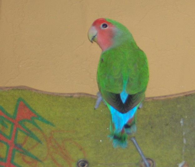 Rosenhodet dvergpapegøye. Tiko Flying.